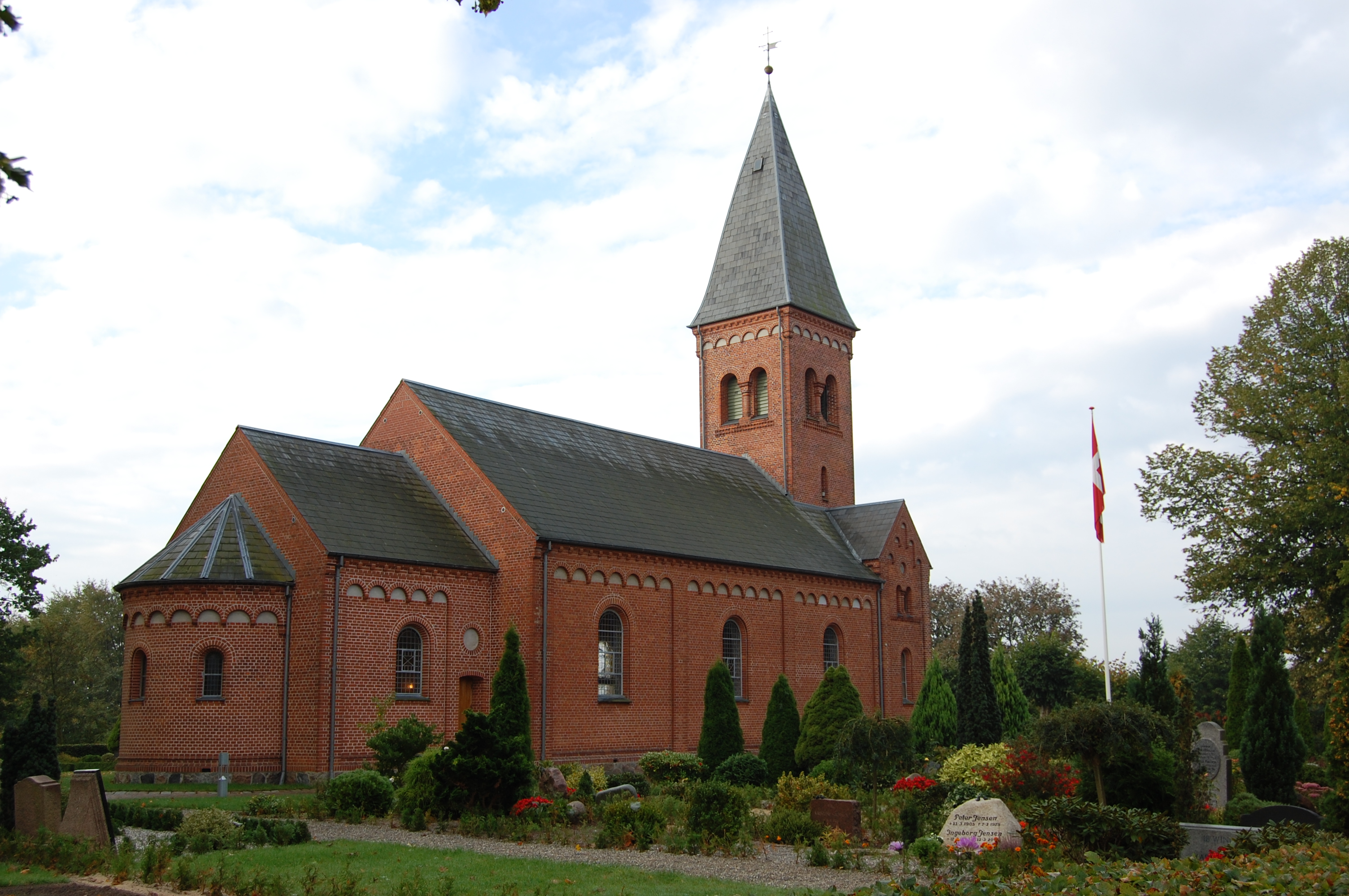 Billede af Bredballe kirke